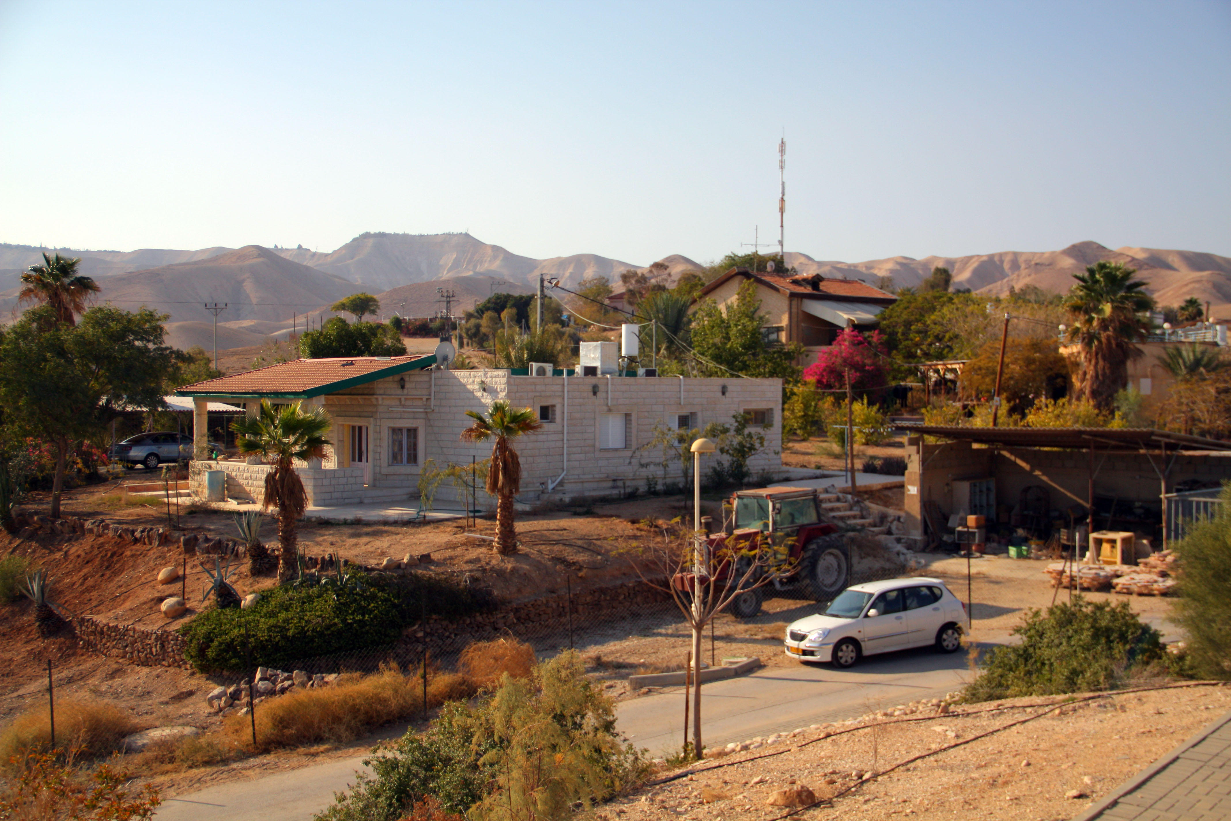 . Vered Yeriho